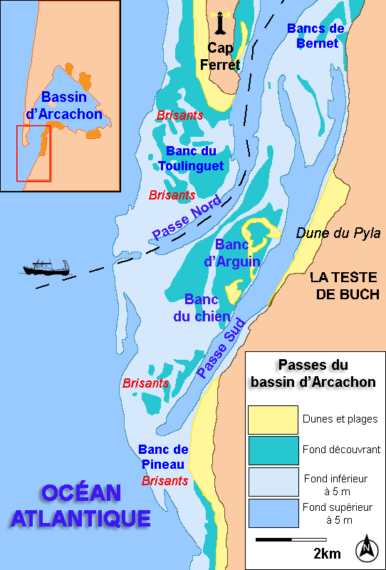 Description : Passes d'entrée dans le Bassin d'Arcachon Place : Arcachon, France Date : 2006 Réalisation : Pline